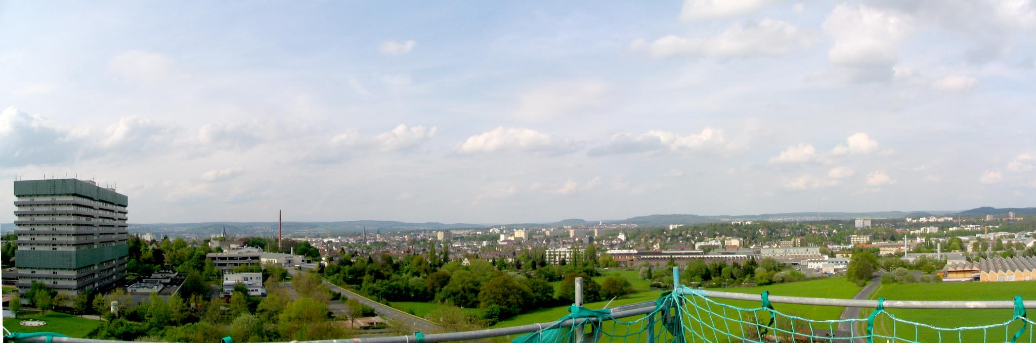 Panorama von Gießen, Panorama-Foto zusammengesetzt aus 4 Einzelfotos